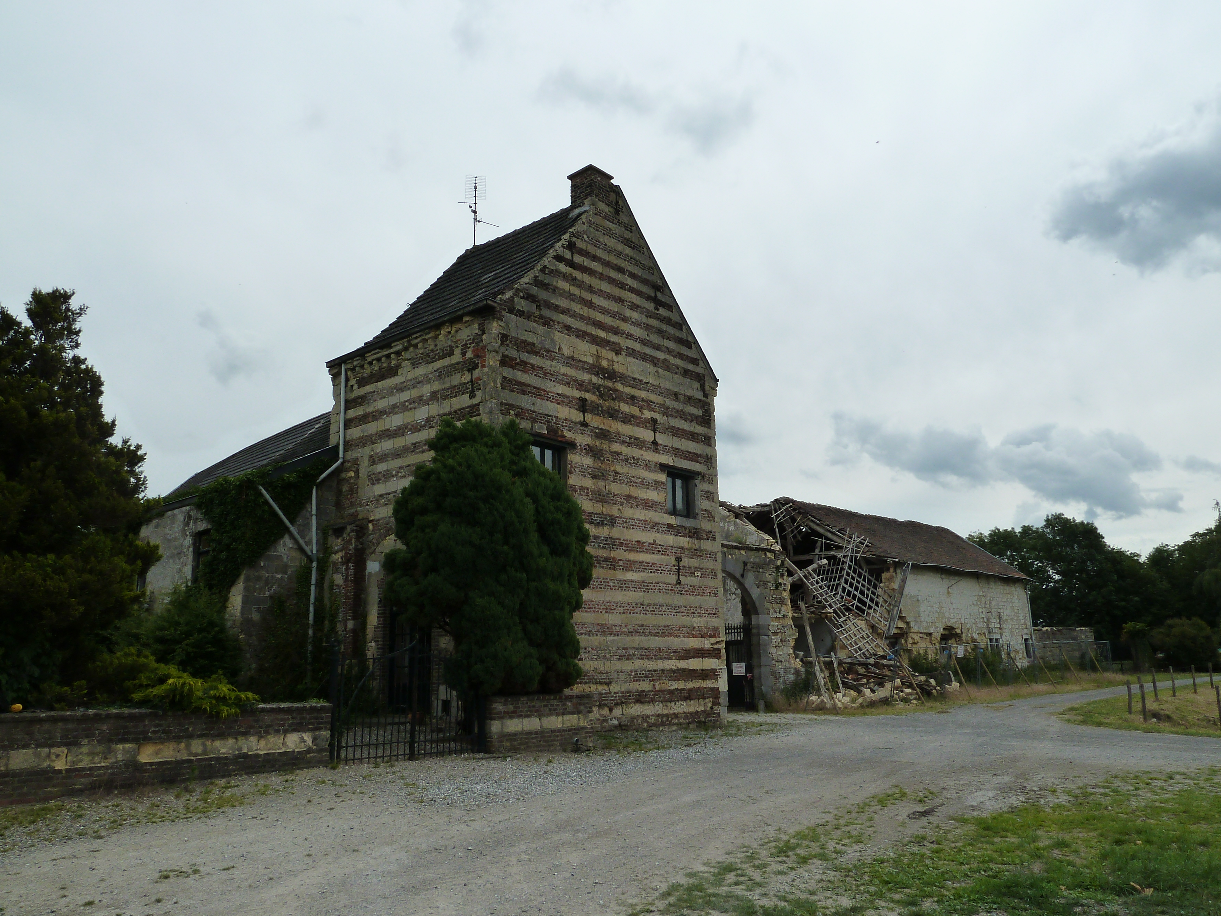 Caestert, Visé, Belgique